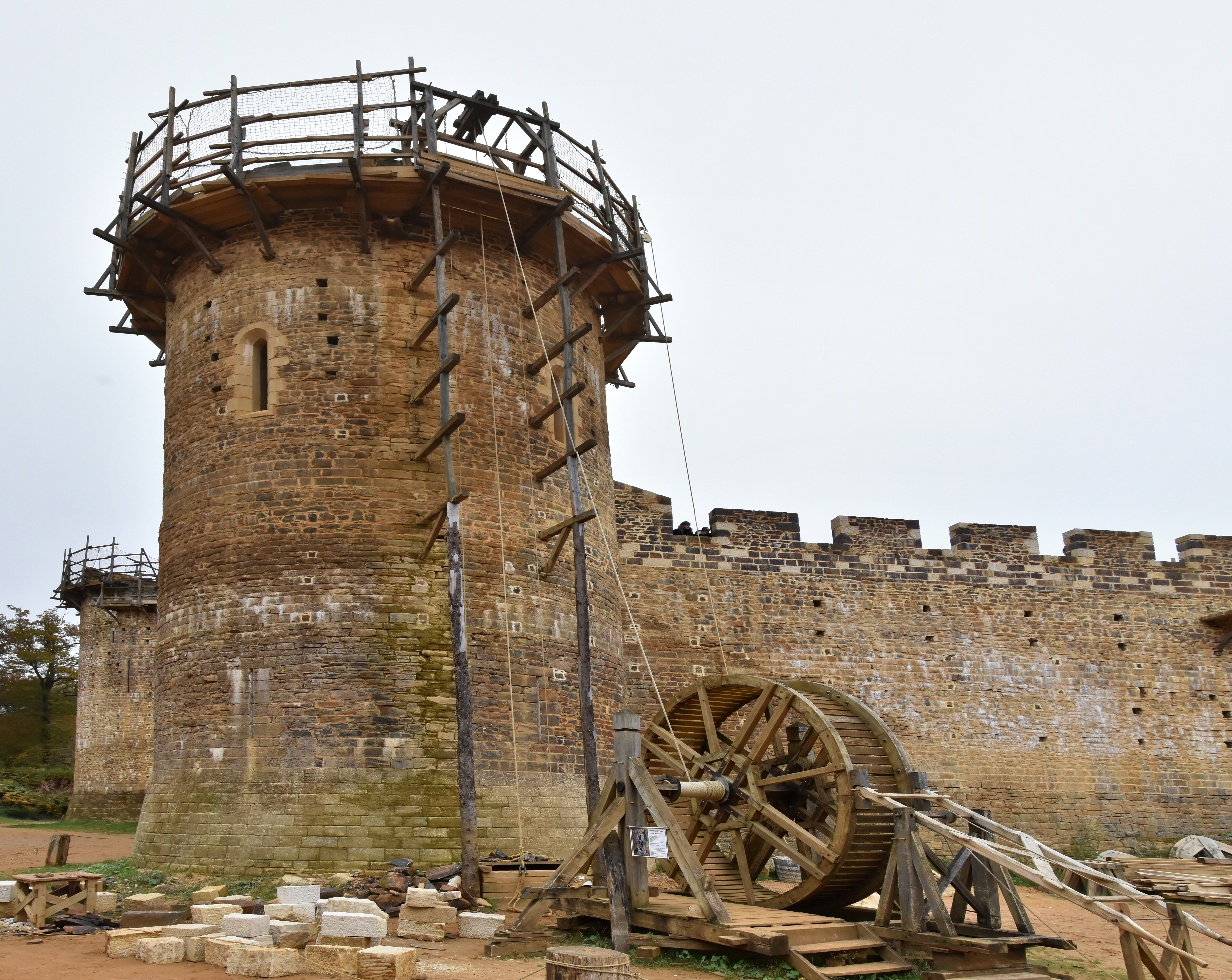 De tredmolen bij de kapeltoren van het kasteel van Guédelon